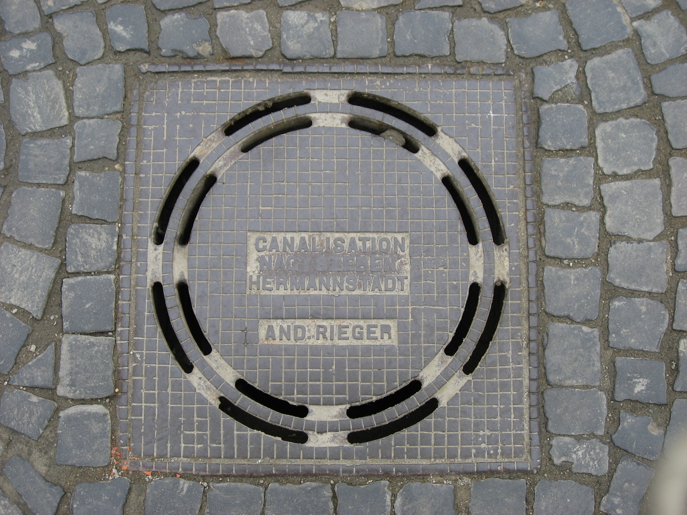 alter von der Firma Andreas Rieger (später Independenţa) vor 1918 produzierter Kanaldeckel in Hermannstadt/Sibiu/Nagyszeben